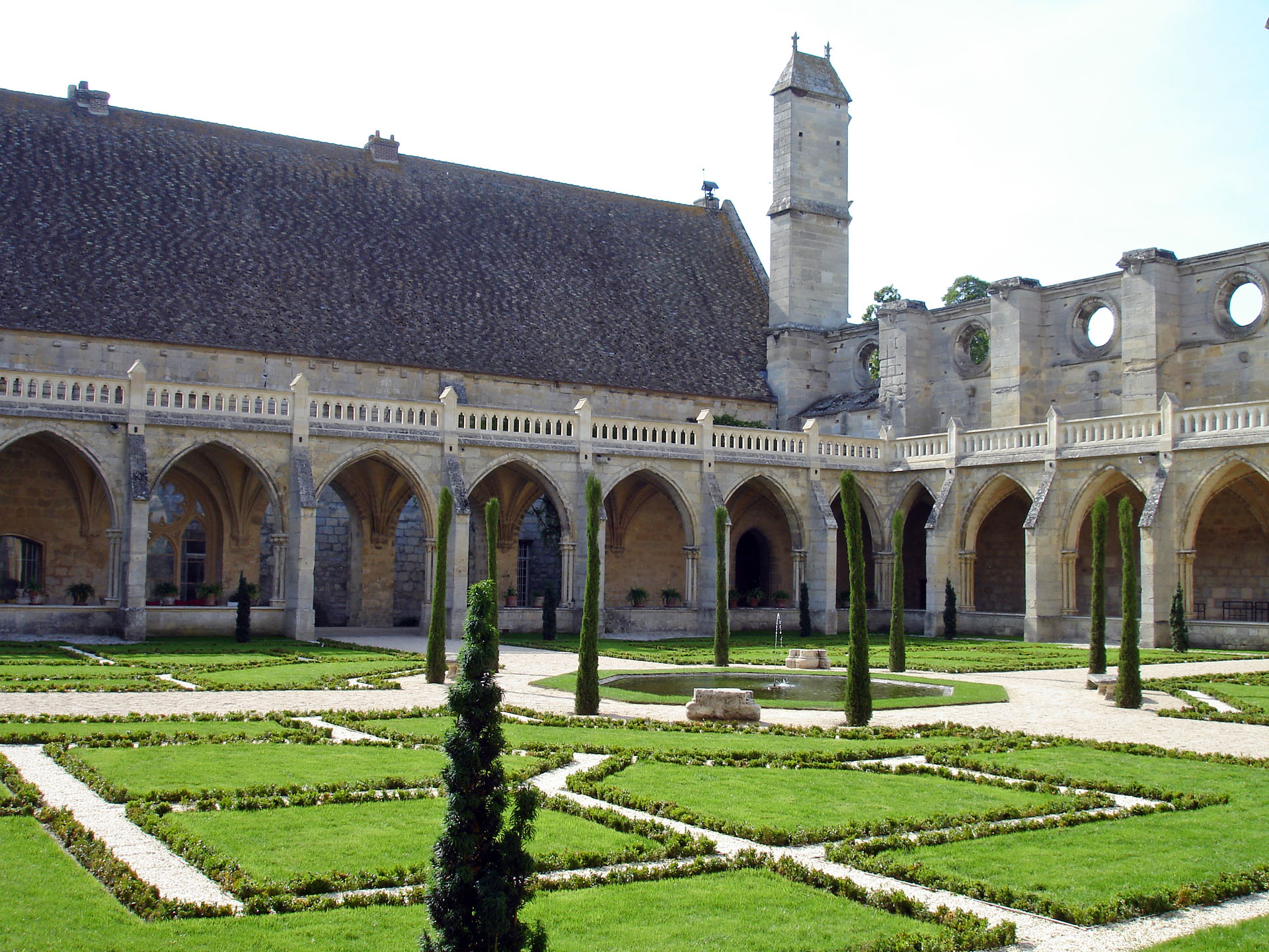 La galerie ouest du cloître et le bâtiment des convers de l'abbaye de Royaumont, Val-d'Oise, France.